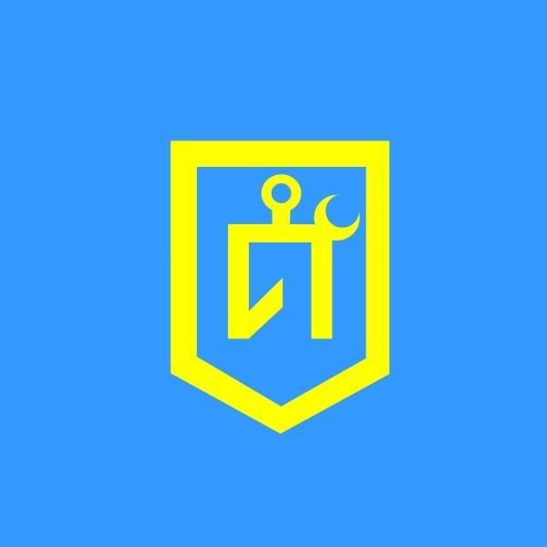 Герб громадського руху "Вільний Ідель-Урал"